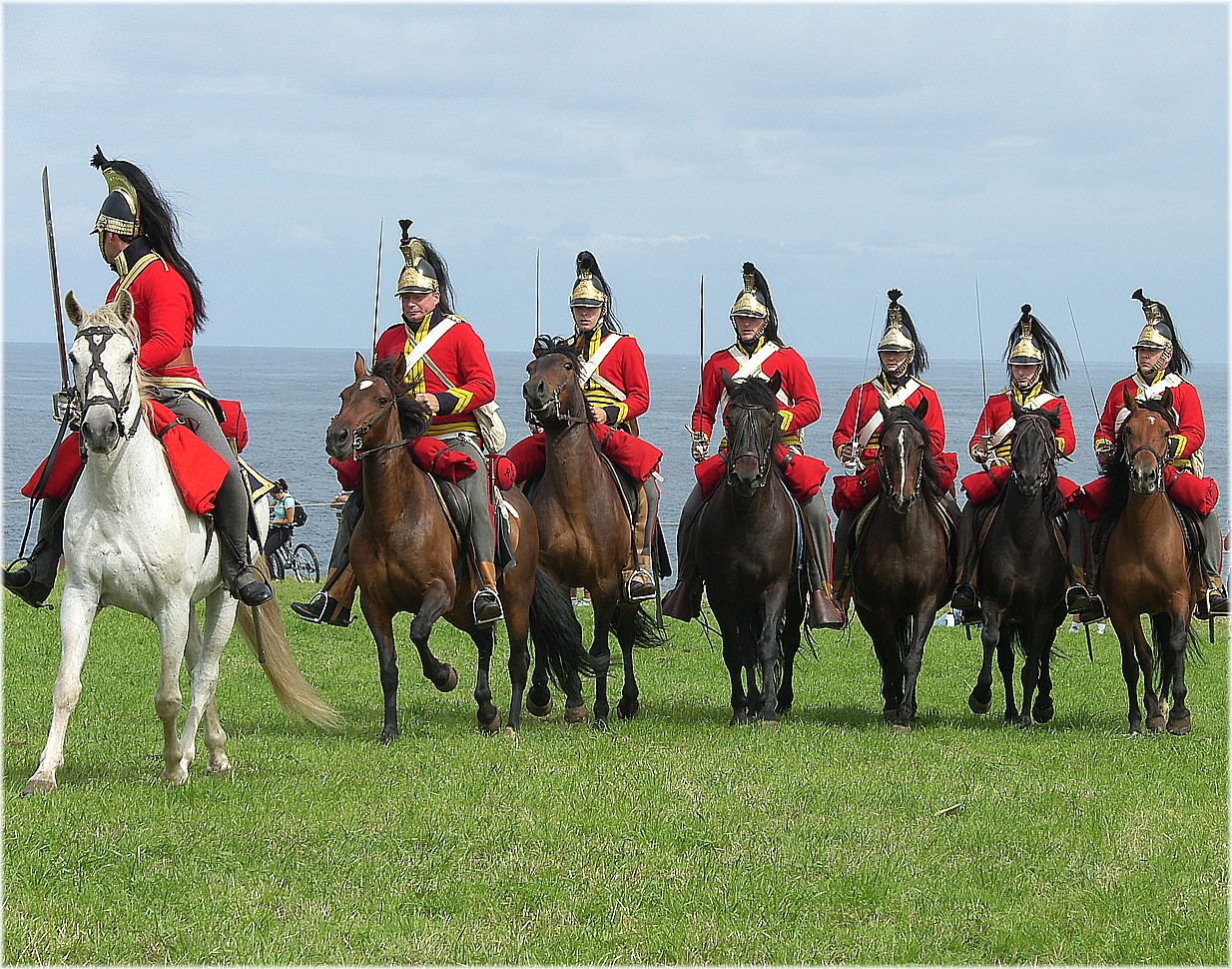 Recreacion de la Batalla de Elviña en las afueras de A Coruña hace 200 años, que se realiza en las inmediaciones de la Torre de Hercules por ser un espacio bien adecuado. Franceses contra Ingleses donde se produjo la muerte de Sir John Moore, el general Ingles. Los franceses trataban de evitar el embarco de las tropas inglesas en el puerto de Coruña y estos para evitarlo habian destruido el puente del Burgo, pero fueron alcanzados en Elviña a la entrada de la ciudad donde se produjo la batalla.